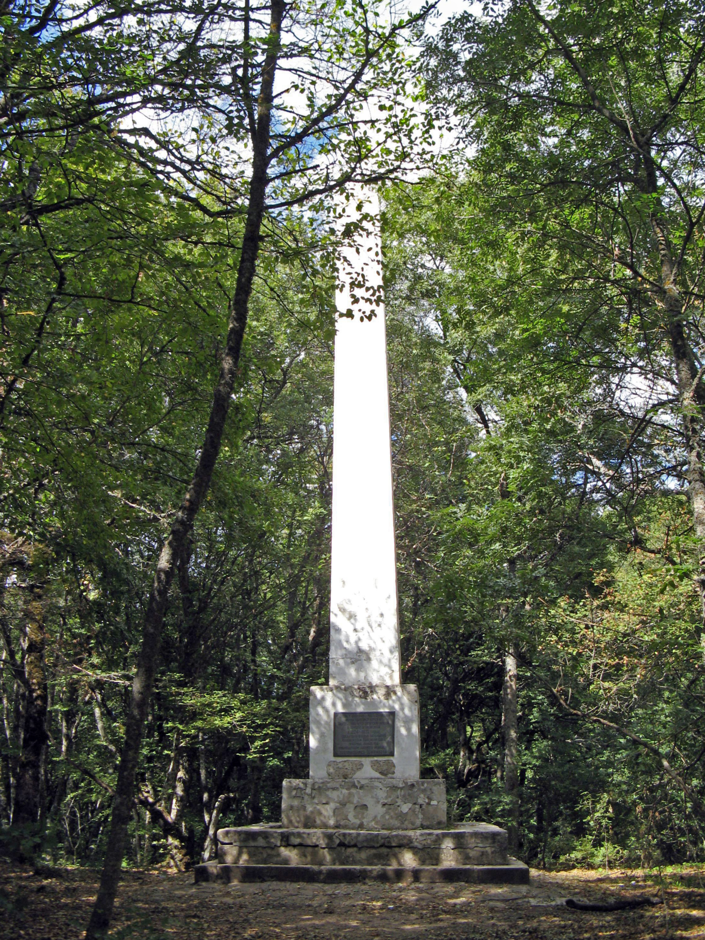 Пам'ятний знак на честь закінчення будівництва дороги Сімферополь-Алушта. Дата події: 1824-1826 рр. 33-й км шосе Сімферополь-Алушта, Ангарський перевал